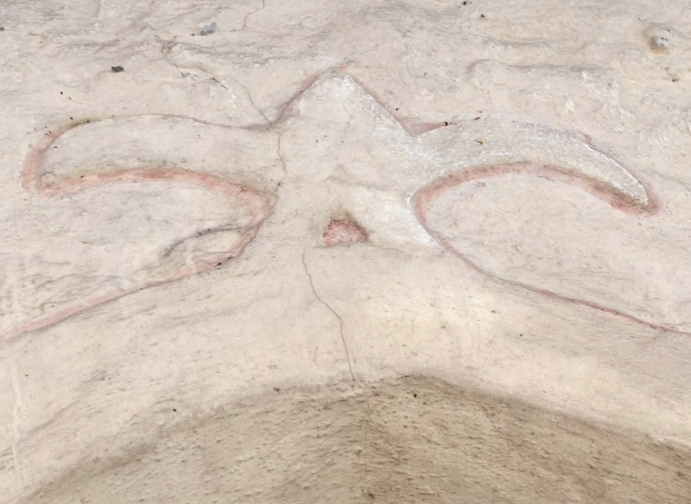 Rune mit Rabendarstellung an der Schäferkappele in Rasch